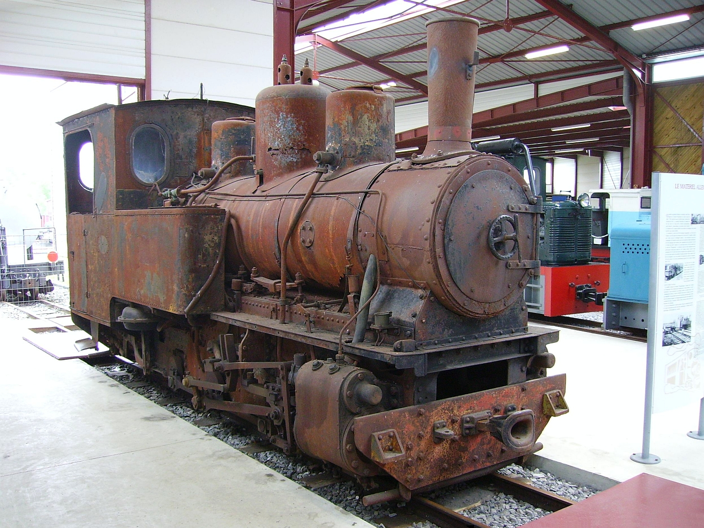 La 050 T N°12 (Orenstein & Koppel N°8285 de 1917) du Chemin de fer Froissy-Cappy-Dompierre le 27 Mai 2007.